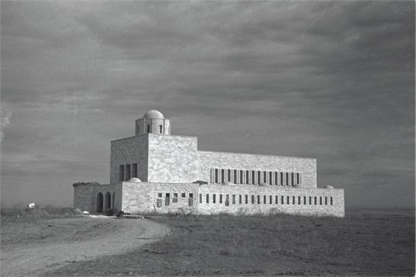 יבנה - בנין הישיבה הגדולה "כרם ביבנה"